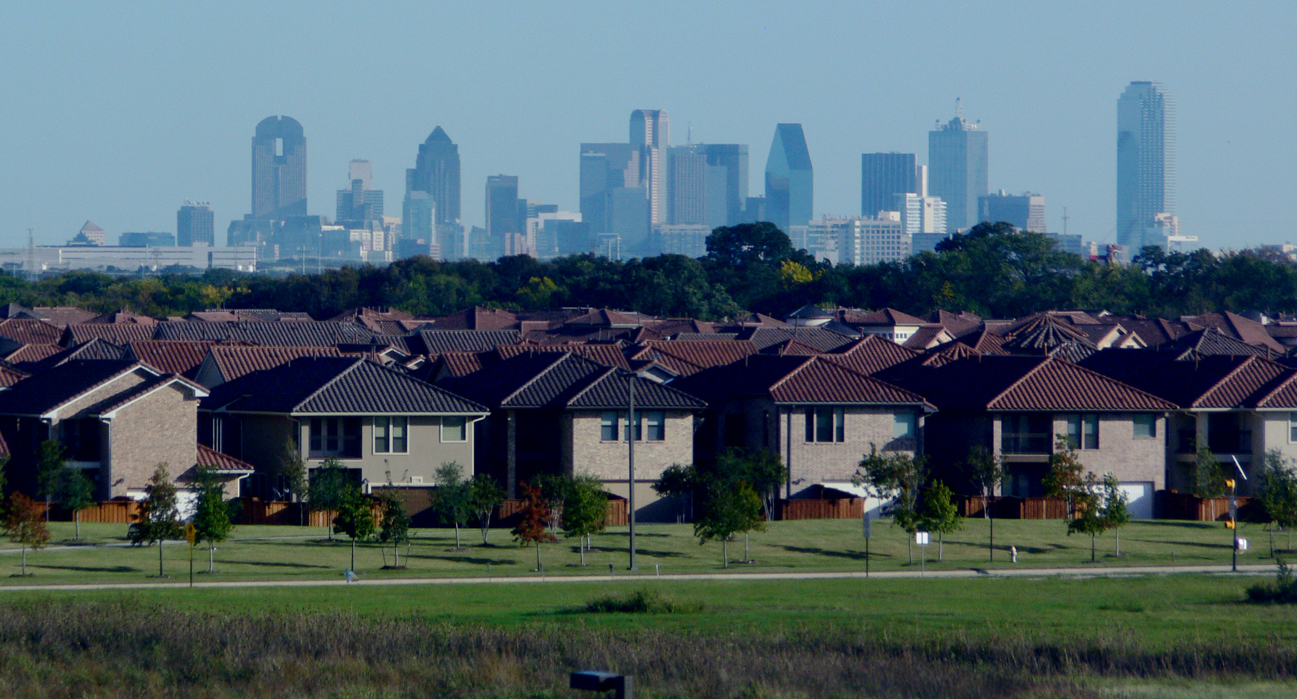 Dalas skyline and suburbs